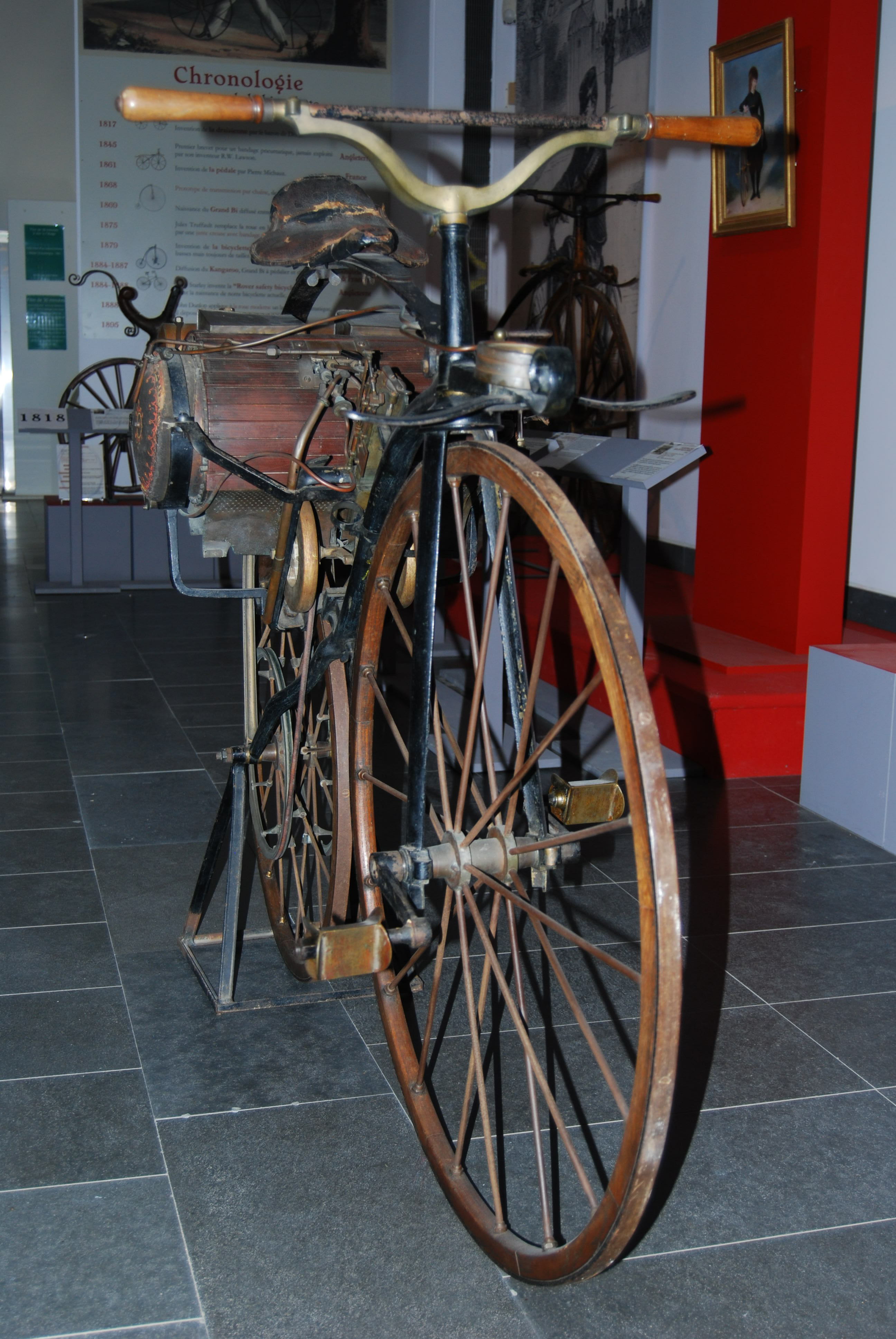 Perreaux, 1ère moto de l'Histoire; auteur : Guy Rolland